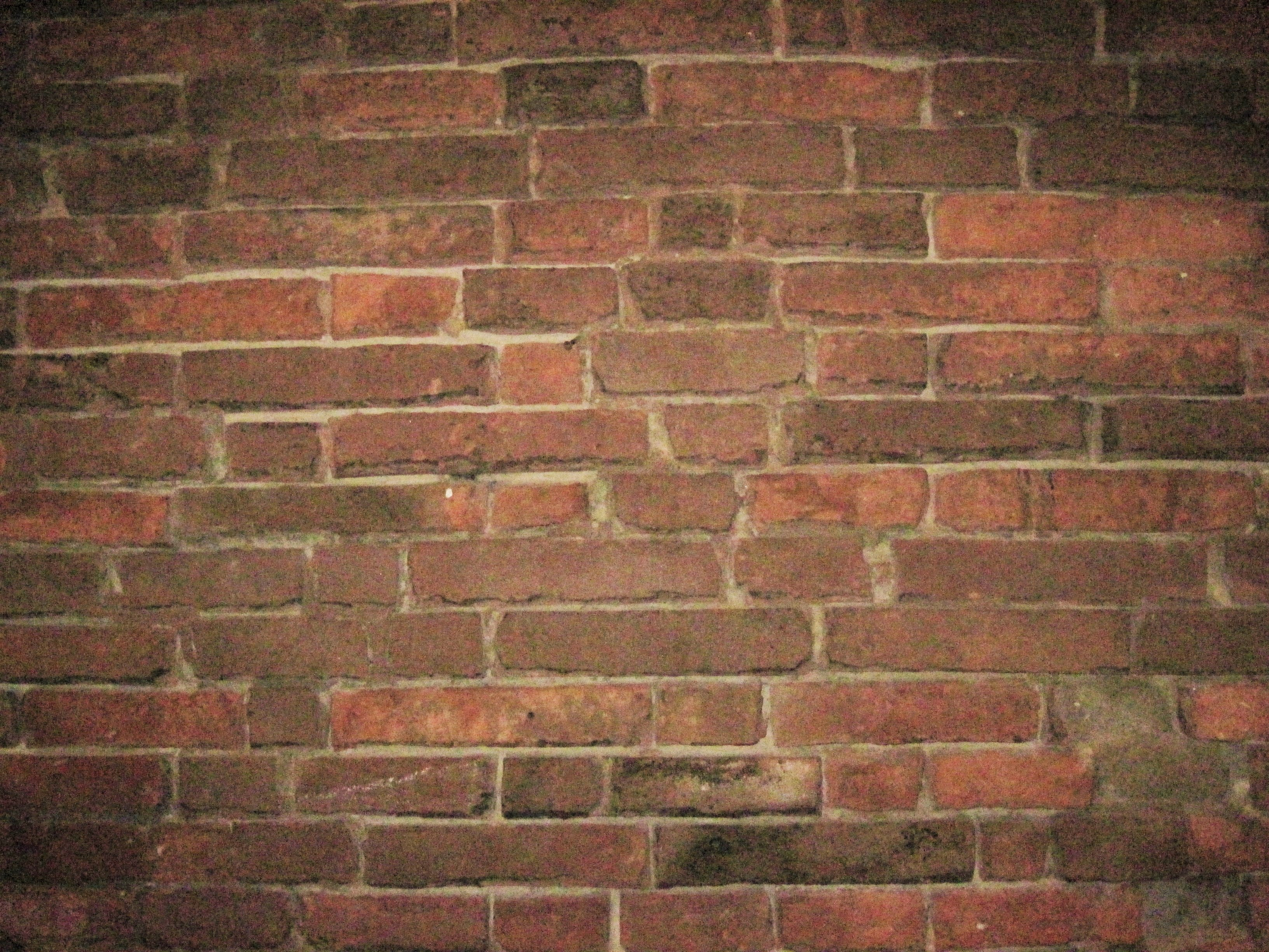 Laterizio tipico delle architetture ferraresi medievali e rinascimentali